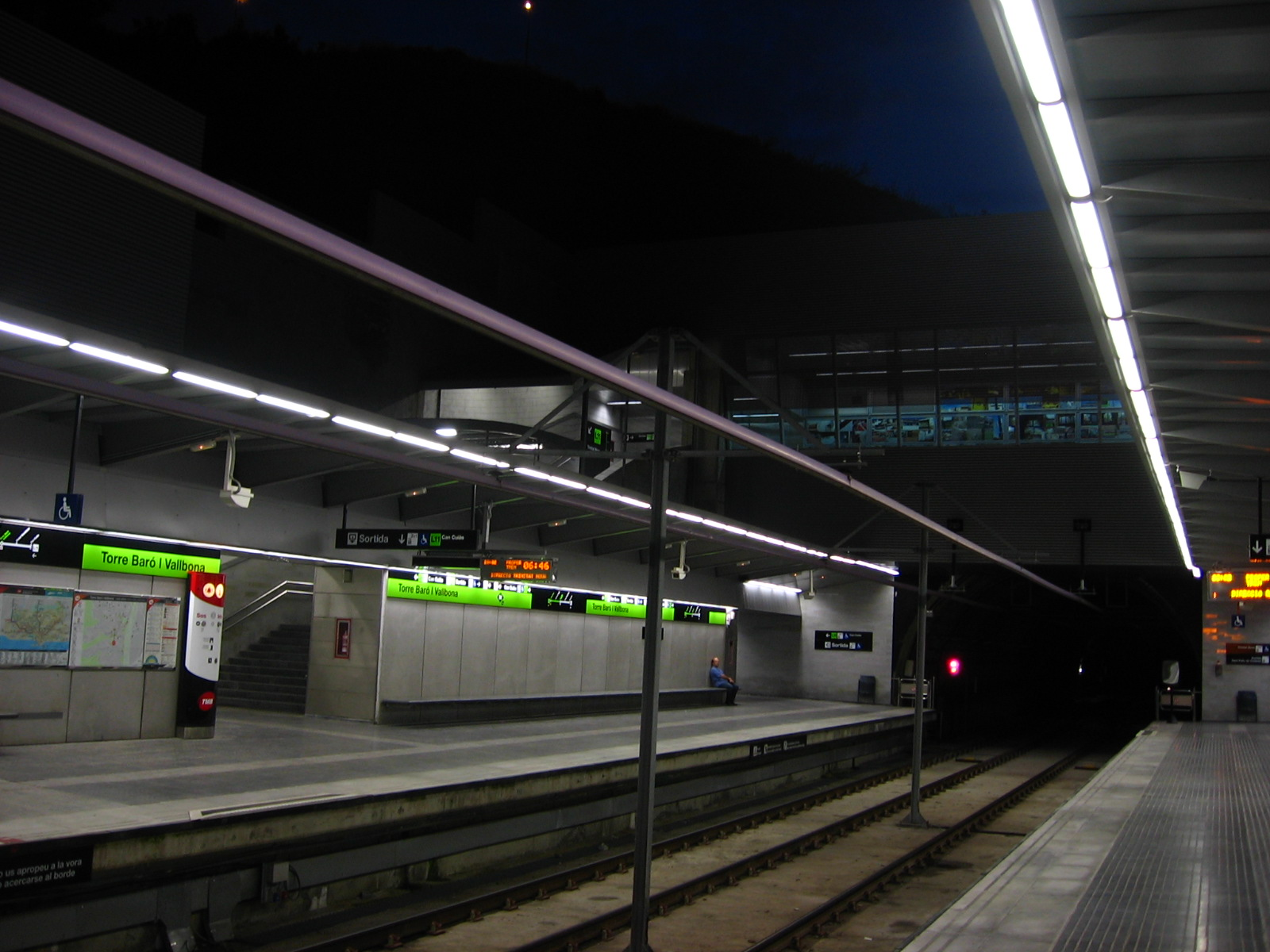 Torre Baró-Vallbona station, Barcelona Metro/Estació Torre Baró-Vallbona, Metro de Barcelona